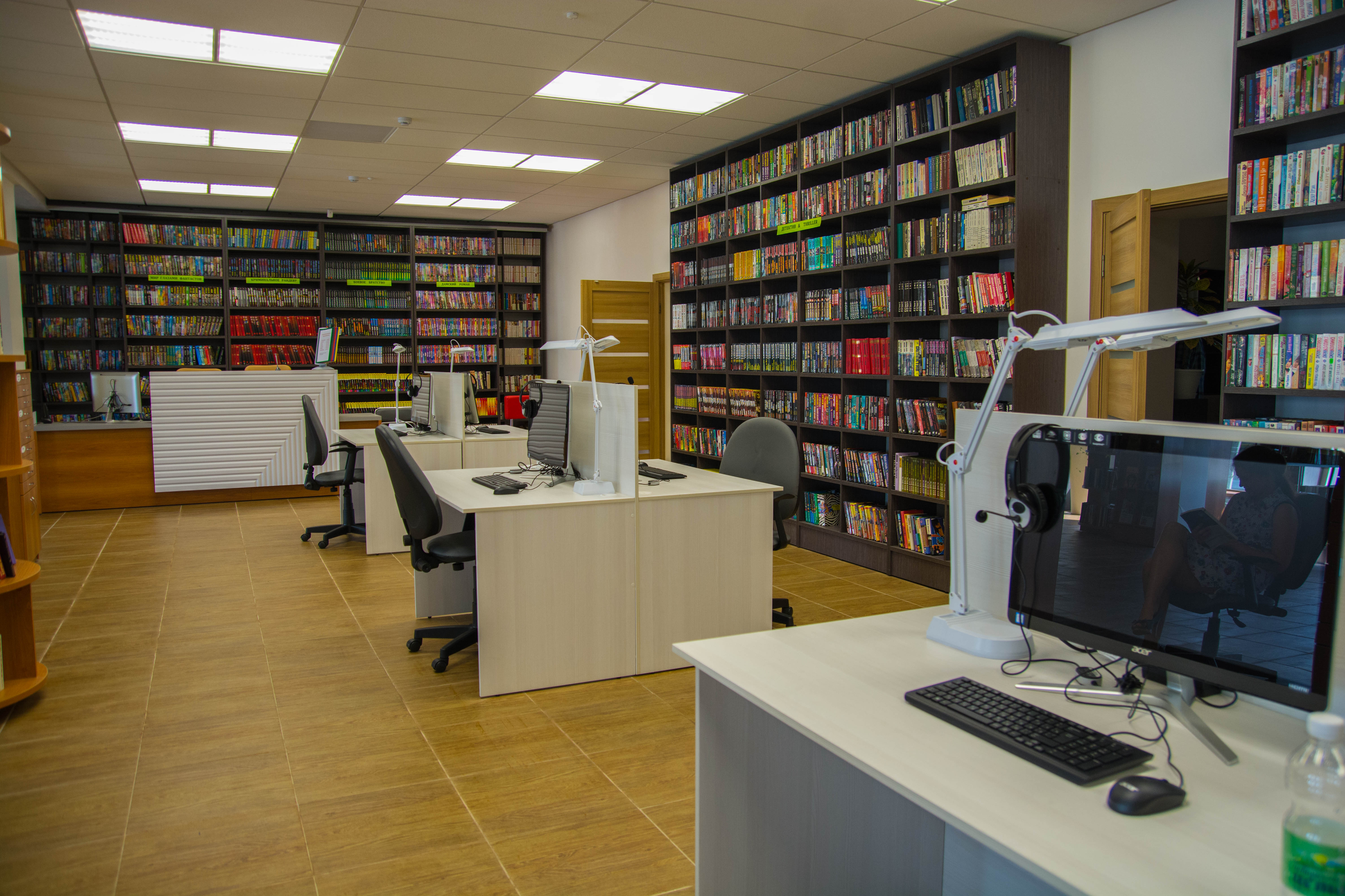 Помещение центральной библиотеки города Троицка, Челябинской области. июль 2018